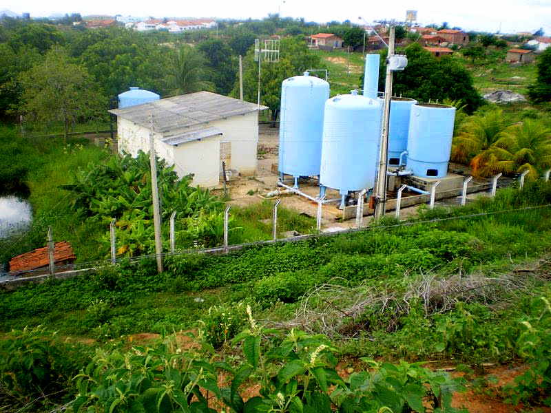 Maquinas que fazem o tratamento da água da cidade de Riacho Dos Cavalos